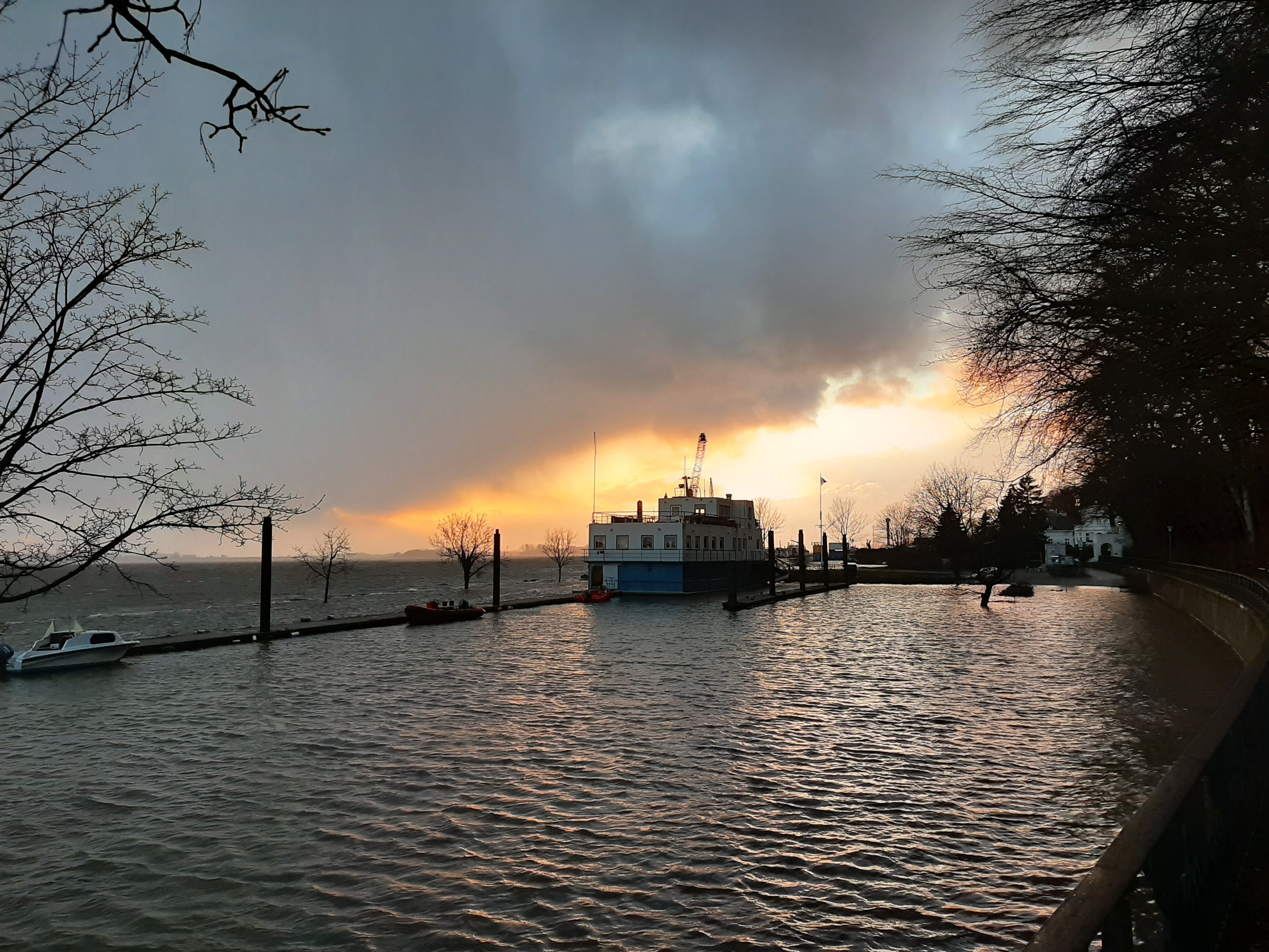 Der Jollenhafen Blankenese beim Blankeneser Segel-Club bei einem winterlichen Hochwasser.